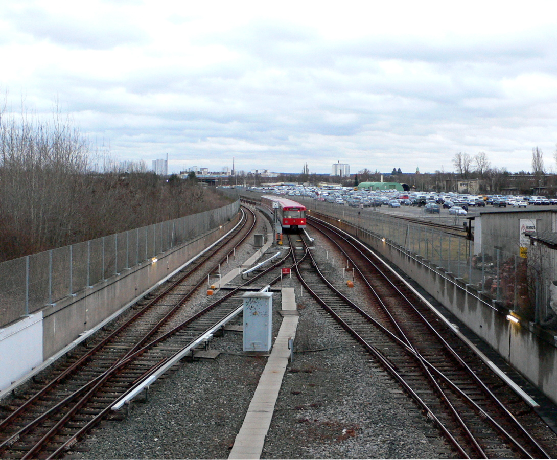 U-Bahn Nürnberg, Abstellanlage Hasenbuck mit DT1-Langzug (431/432-unbekannt)